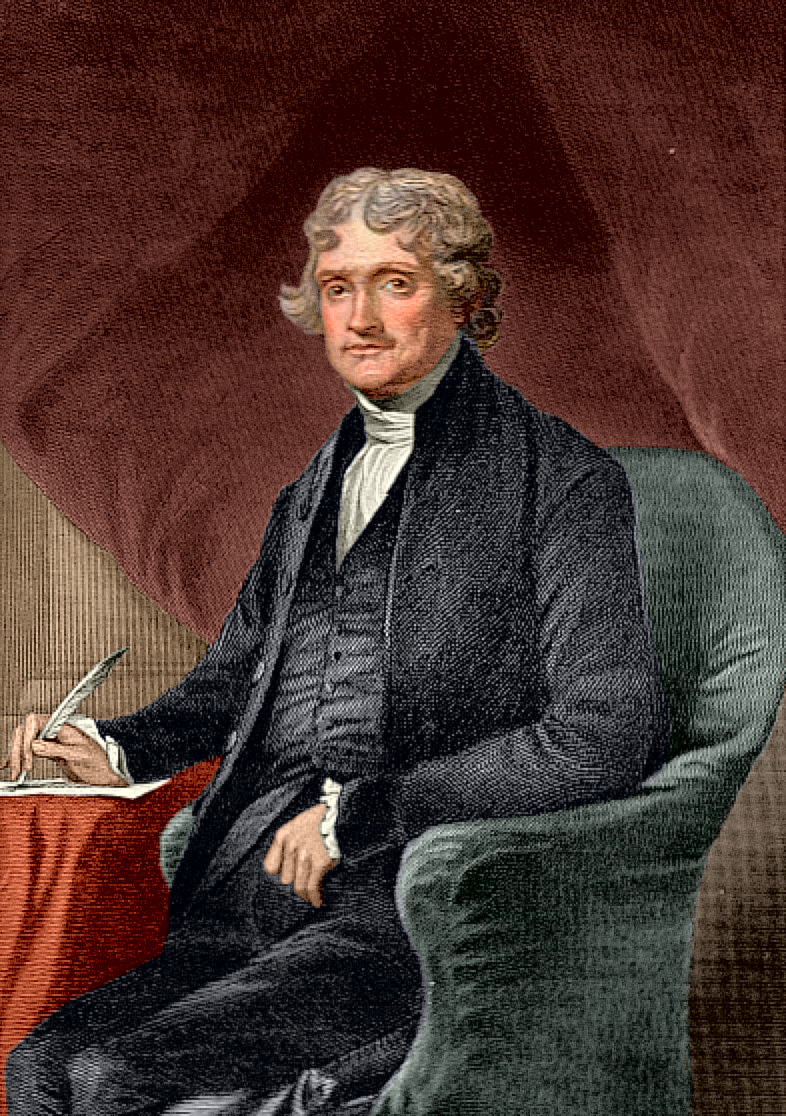 Thomas Jefferson PD tekening van UT Library, ingekleurd naar bestaand schilderij.